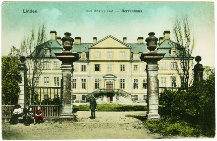 Um 1900: Blick von Süden auf die Toranlage und das ehemalige Lindener Schloss im Von-Alten-Garten am Lindener Berg in Hannover ...